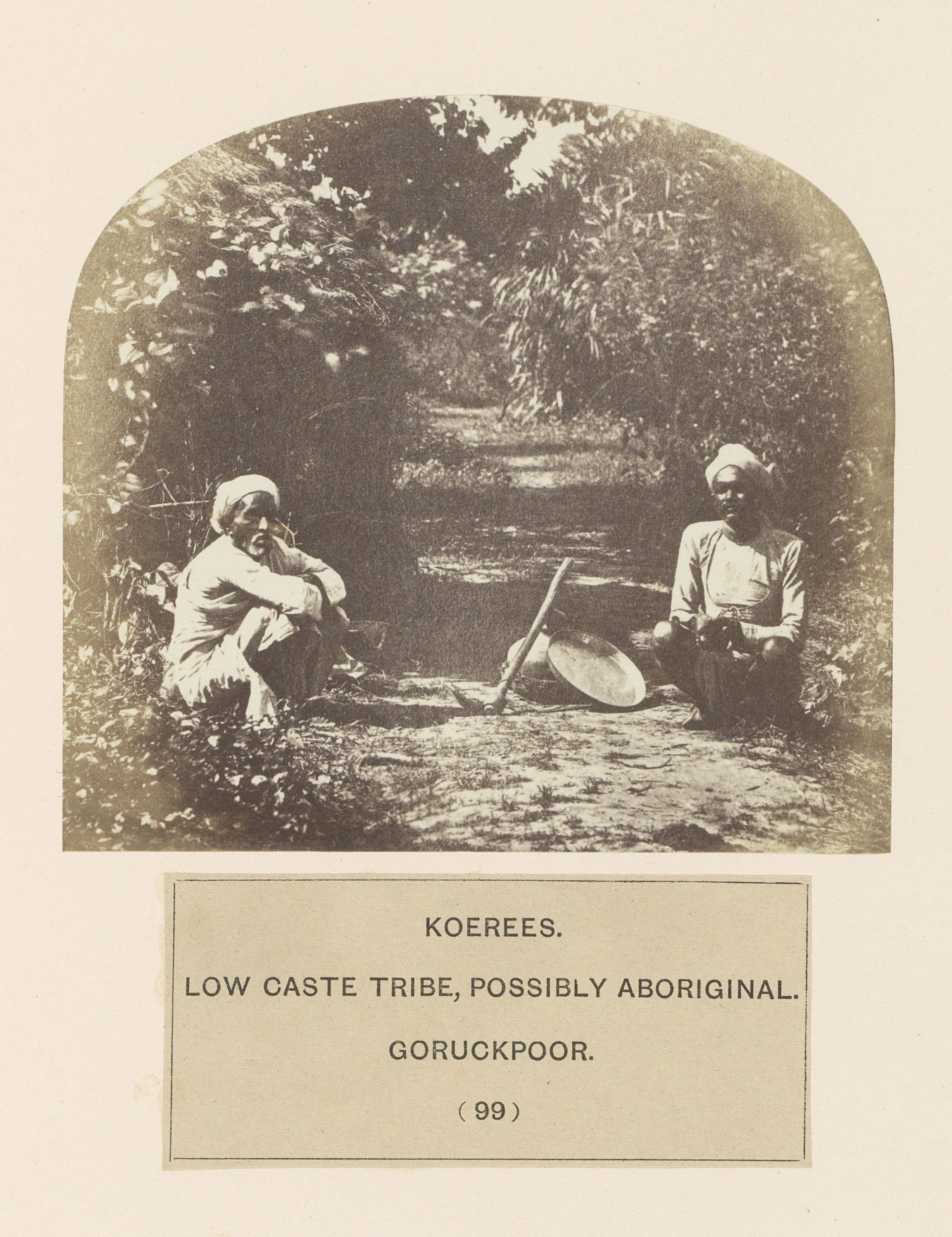 IdentificatieTitel(s): Twee Koeri mannen op een pad in Gorakhpur met gereedschap voor de landbouwKoerees. Low caste tribe, possibly aboriginal. Goruckpoor (titel op object)Objecttype: foto bladzijde Objectnummer: RP-F-2001-7-1122B-44Opschriften / Merken: nummer, recto, gedrukt: ‘(99)’VervaardigingVervaardiger: fotograaf: anoniemPlaats vervaardiging: GorakhpurDatering: ca. 1858 - in of voor 1868Materiaal: fotopapier Techniek: albuminedrukAfmetingen: foto: h 98 mm × b 108 mmOnderwerpWat: menselijke rassen; mensen; nationaliteitenroad, pathagricultural implementsVerwerving en rechtenCredit line: Aankoop met steun van de Mondriaan Stichting, het Prins Bernhard Cultuurfonds, het VSBfonds, het Paul Huf Fonds/Rijksmuseum Fonds en het Egbert KunstfondsVerwerving: aankoop 2001Copyright: Publiek domein